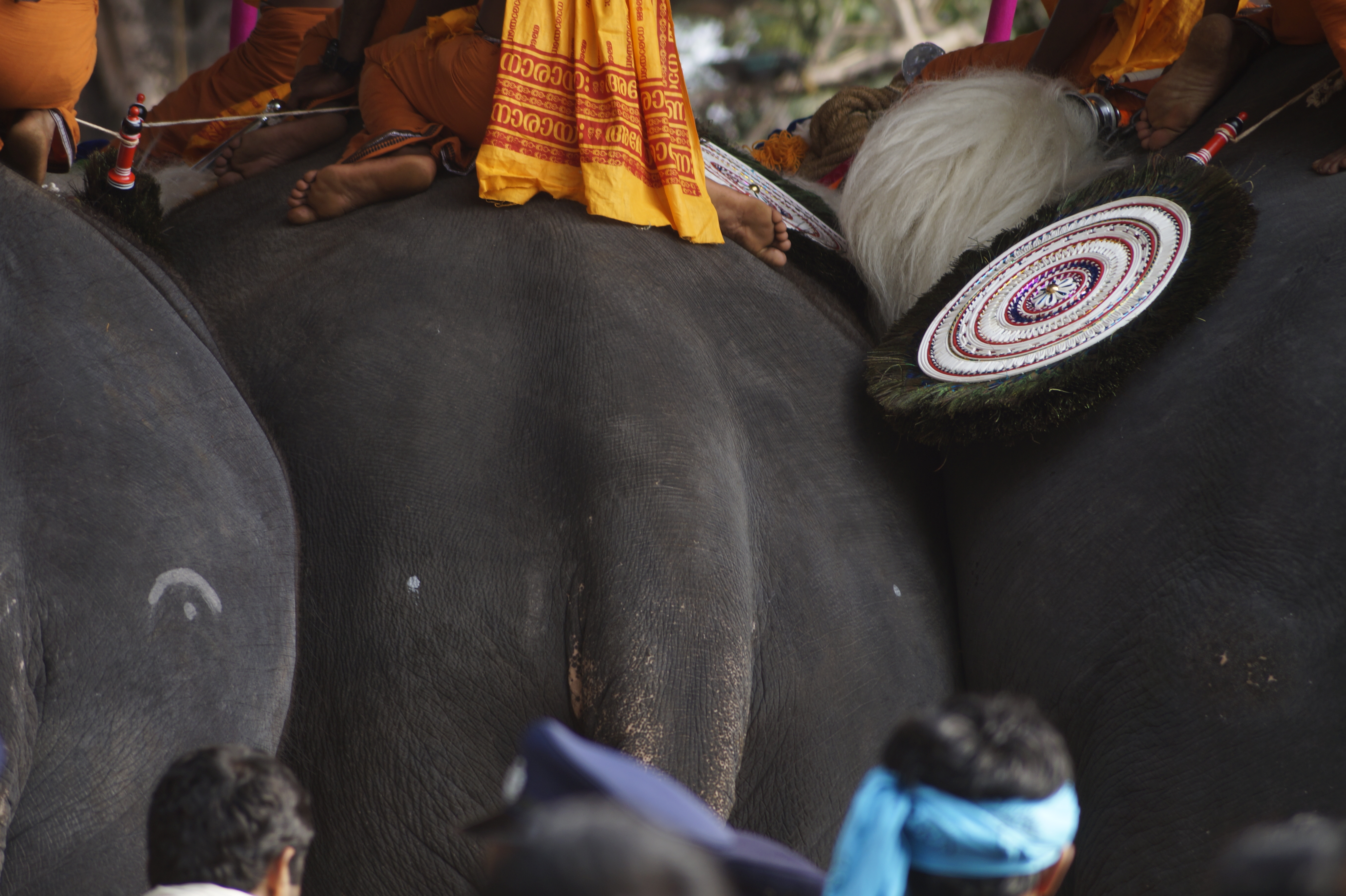 തൃശൂര്‍ പൂരത്തിനായി ആനകളെ നിര്‍ത്തിയിരിക്കുന്നതാണ് ചിത്രം. ഒരു മണിക്കൂറിലധികം ഇതേ നില്പുനില്ക്കേണ്ടിവരുന്നുണ്ട്.